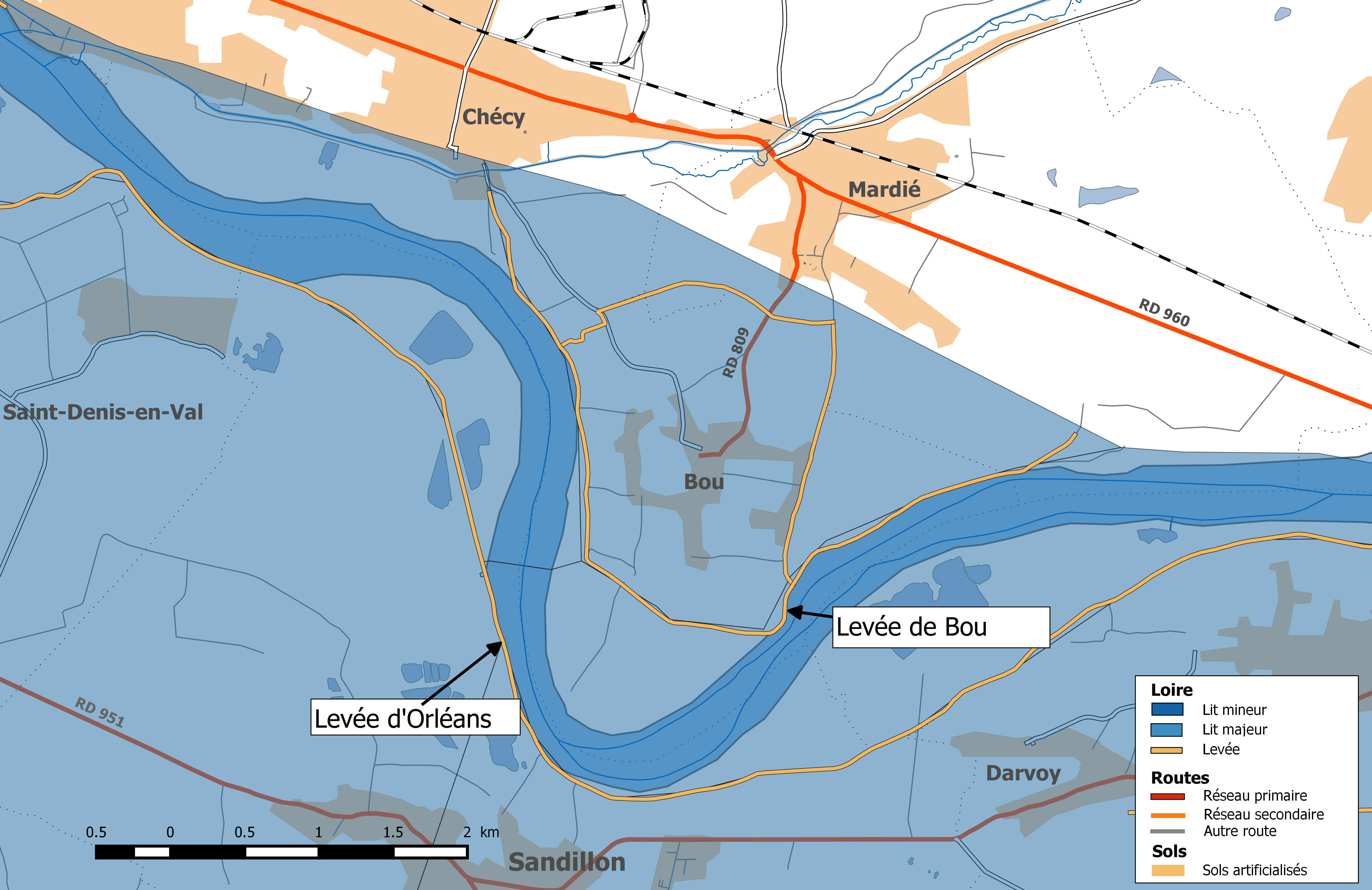 Système d'endiguement de la Loire dans le département du Loiret. Val de Bou.